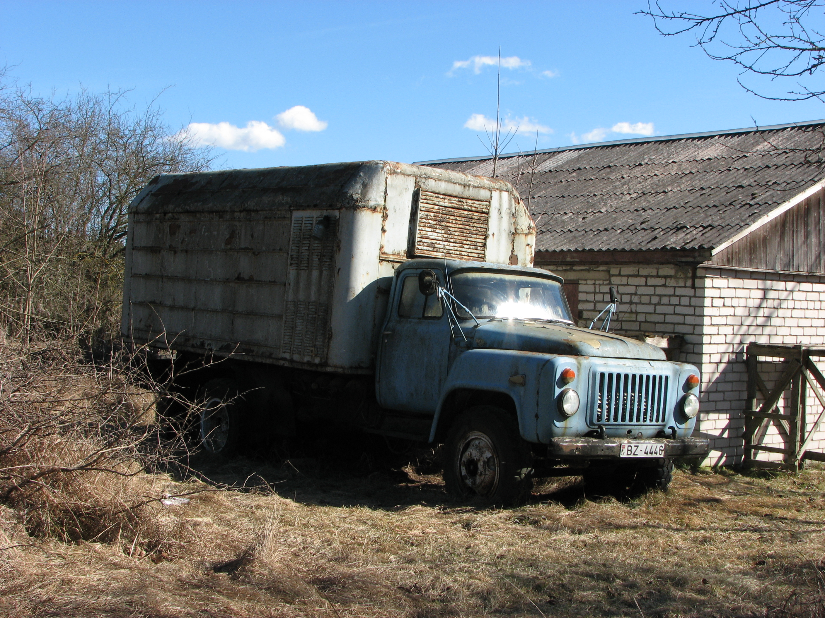 Шасси ГАЗ-53 с изотермическим кузовом завода УЛЗ14/11 в Брянке (такие устанавливались на ЛуАЗ-890Б и прицепы марки ЛуАЗ).